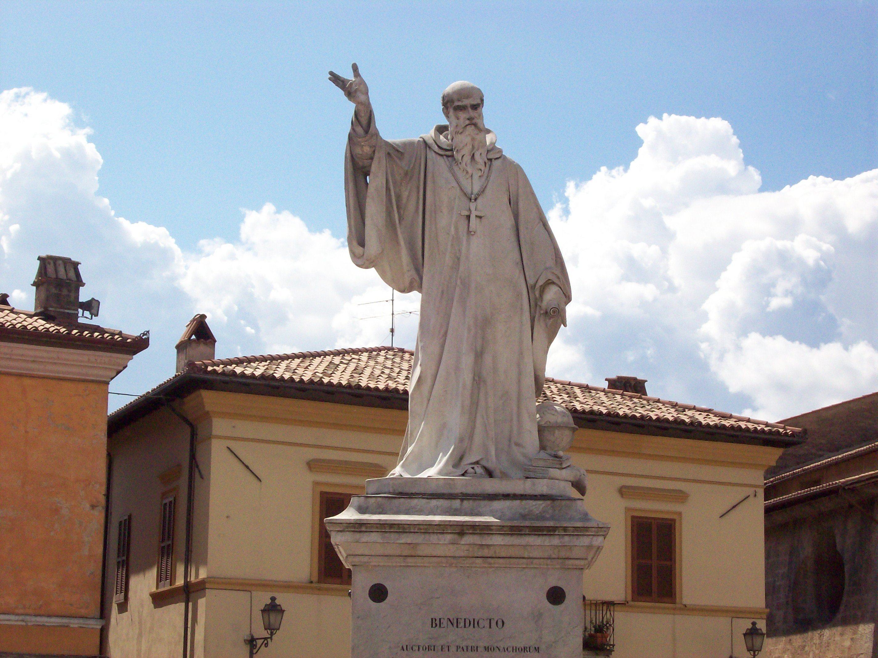 Statua di San Benedetto in centro a Norcia, Umbria